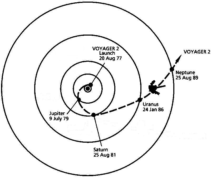 Route Voyager-2 NASA-plaatje dus geen copyrights